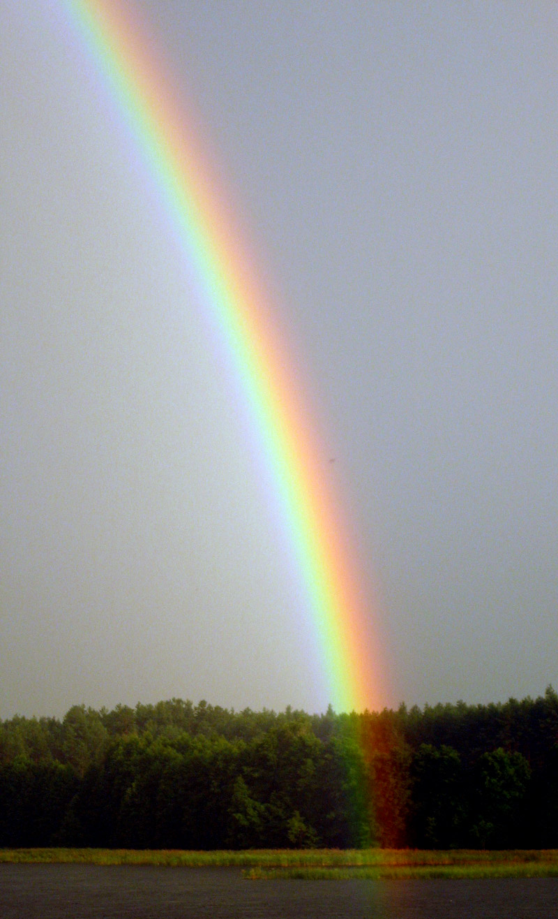 Rainbow above Kaviškis Lake, Lithuania